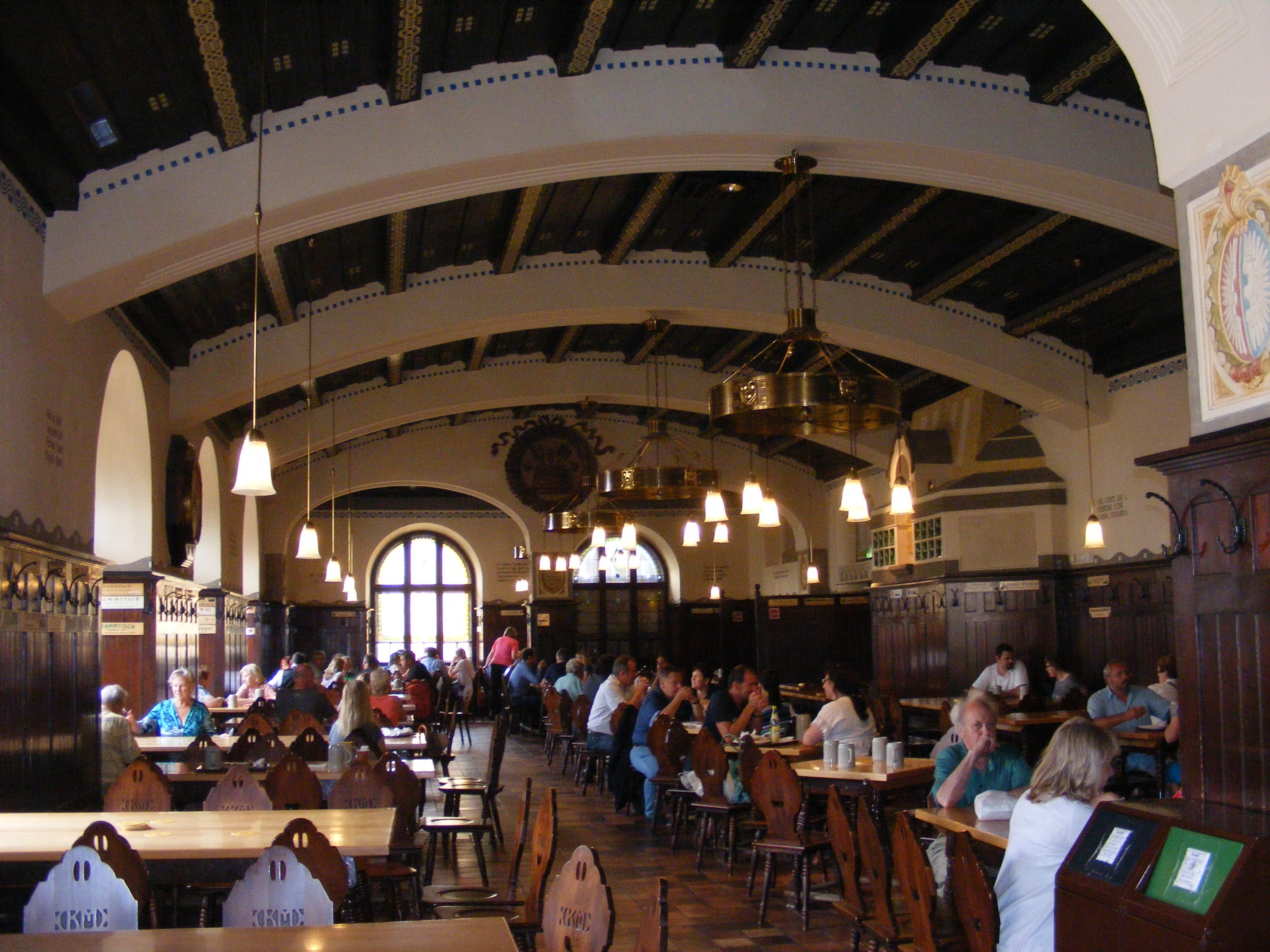 Augustiner Bräu Salzburg - Stockhammersaal